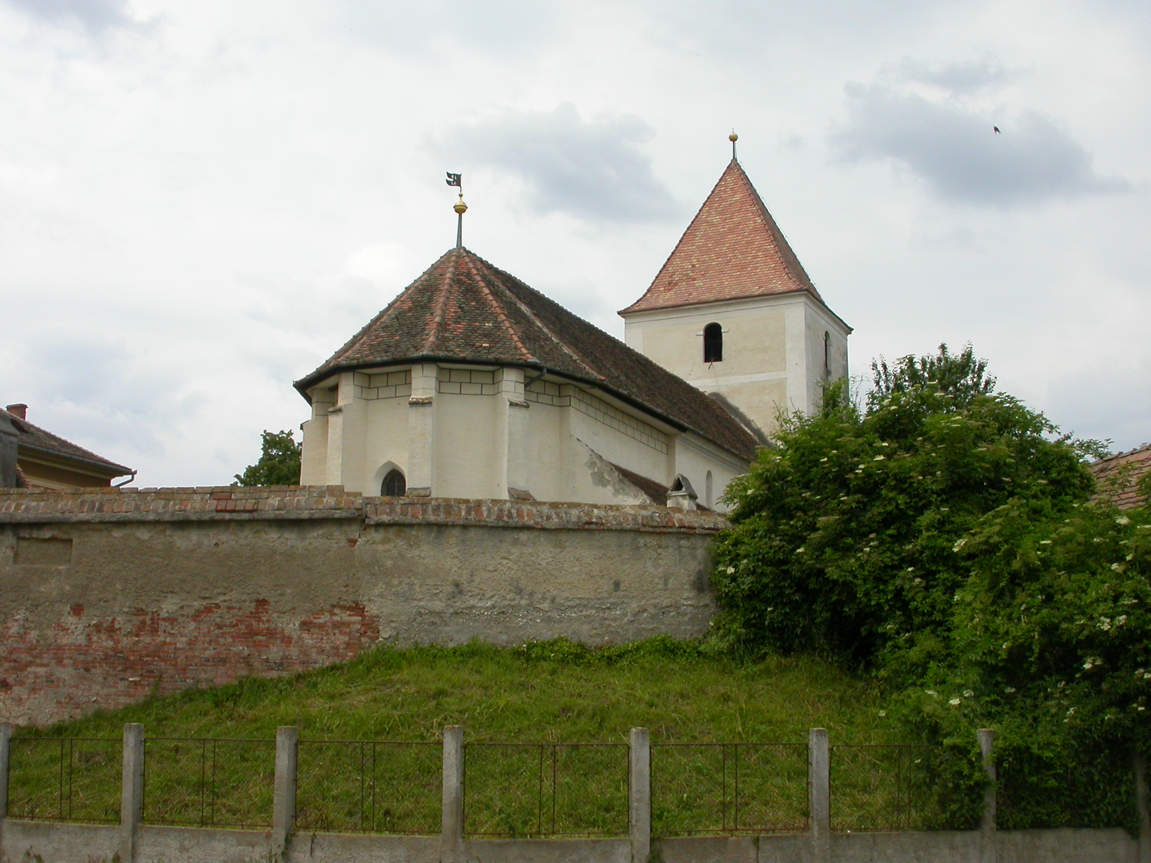 Ansamblul bisericii evanghelice fortificate Gușterița, înc. sec. XIII - sec. XVIII